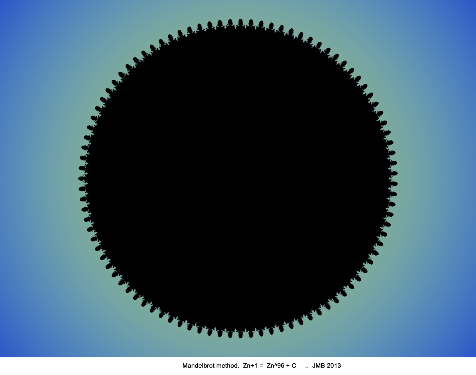 Mandelbrot method. Zn+1 = Zn^96 + C .. JMB 2013